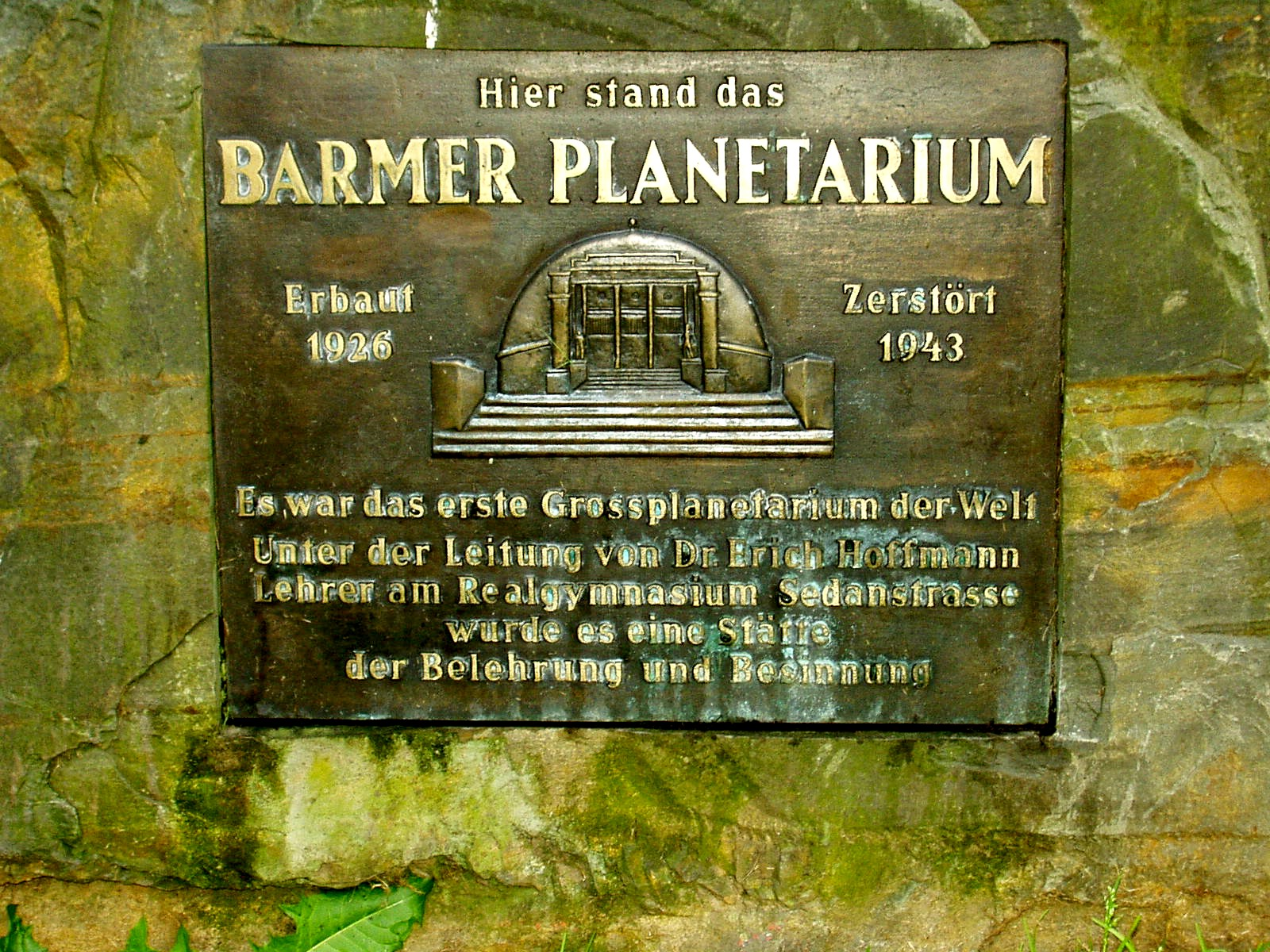 Gedenktafel für das Barmer Planetarium in den Barmer Anlagen. Eigenes Fotos. Aufgenommen 2005-08-01. Urheber: manosGedenktafel für das Barmer Planetarium in den Barmer Anlagen. Eigenes Fotos. Aufgenommen 2005-08-01. Urheber: manos